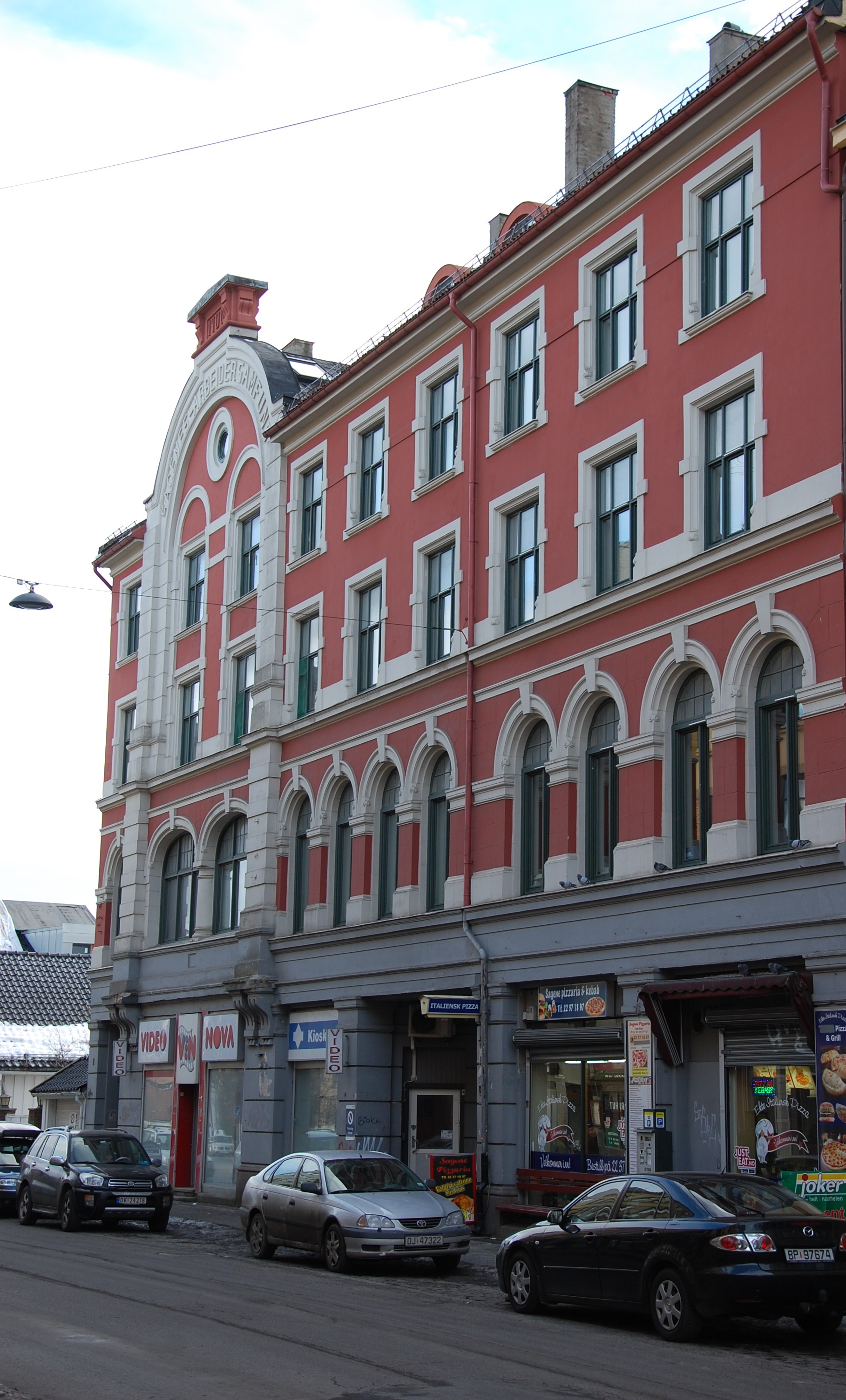 Sagene Arbeidersamfunn, Arendalsgata 3 på Sagene i oslo. Samfunnshus med forretninger i 1. etg. mot gate, forsamlingslokale i 2. etg og boliger i 3. og 4. etg. Bakbygning med teatersal. Arkitekt Johan Storm Munch.